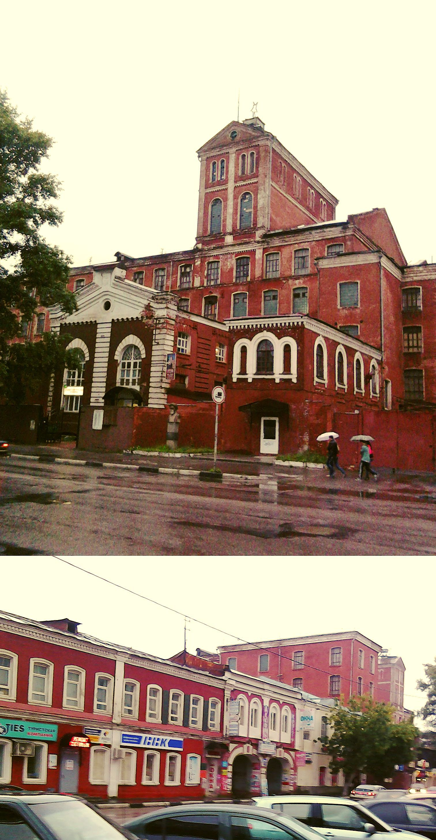 Старый город... "Морозовские" фабрики на ул. Ленина, г. Орехово-Зуево, август 2013